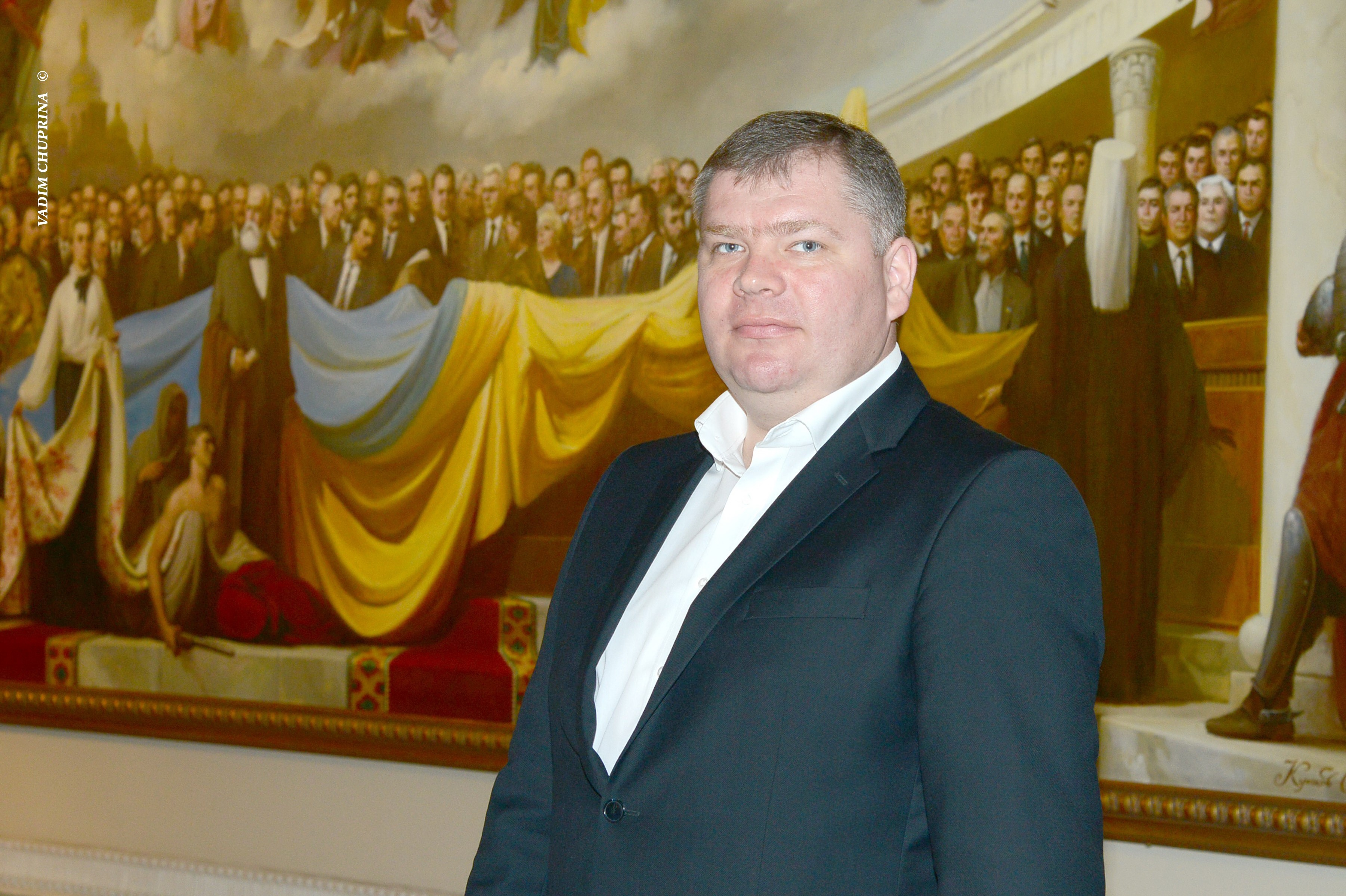 ВЕРХОВНА РАДА УКРАЇНИ 2013 , фото Вадим Чуприна